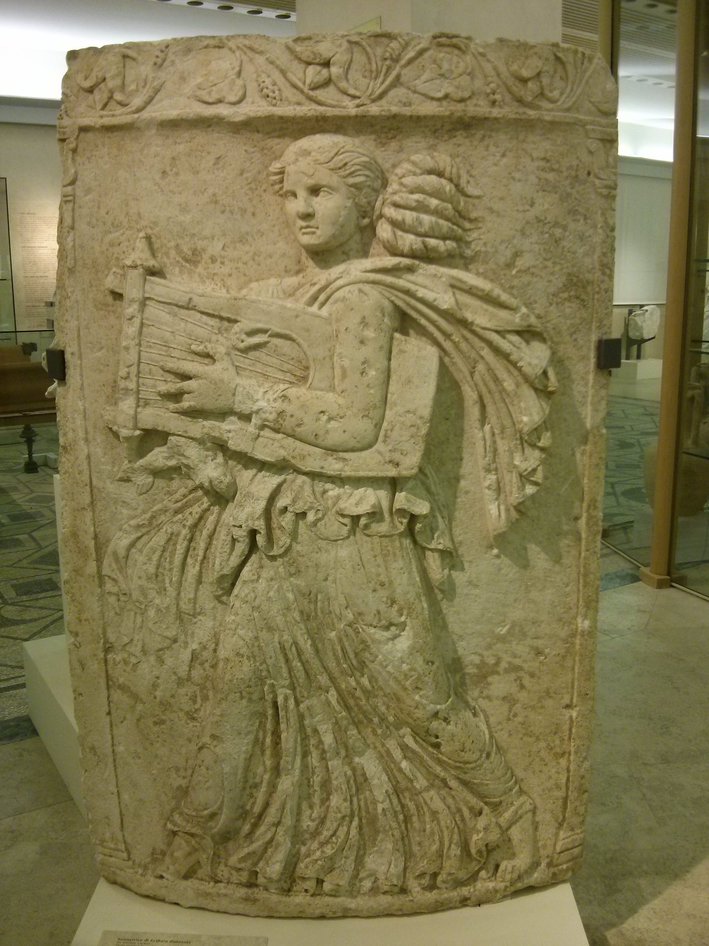 Museo Archeologico Nazionale delle Marche - MIBAC This is a photo of a monument which is part of cultural heritage of Italy.